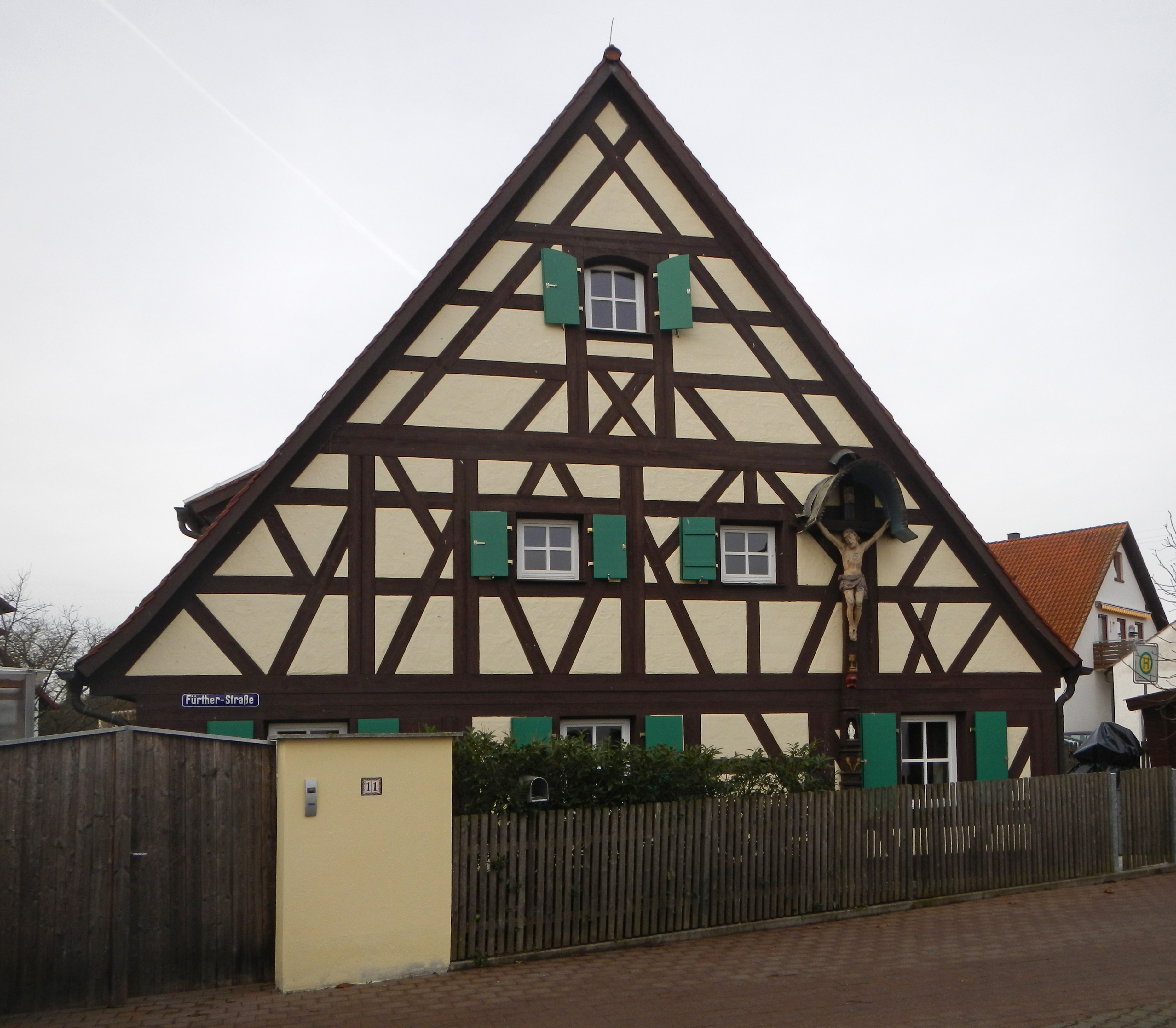 Eingeschossiges ehem. Wohnstallhaus, Dach einseitig halb abgewalmt, Fachwerk, Ende 18. Jahrhundert; Backhaus; davor Kruzifix, Holz, 1. Drittel 18. Jahrhundert in Mittelmembach (Gemeinde Heßdorf) im Landkreis Erlangen-Höchstadt.